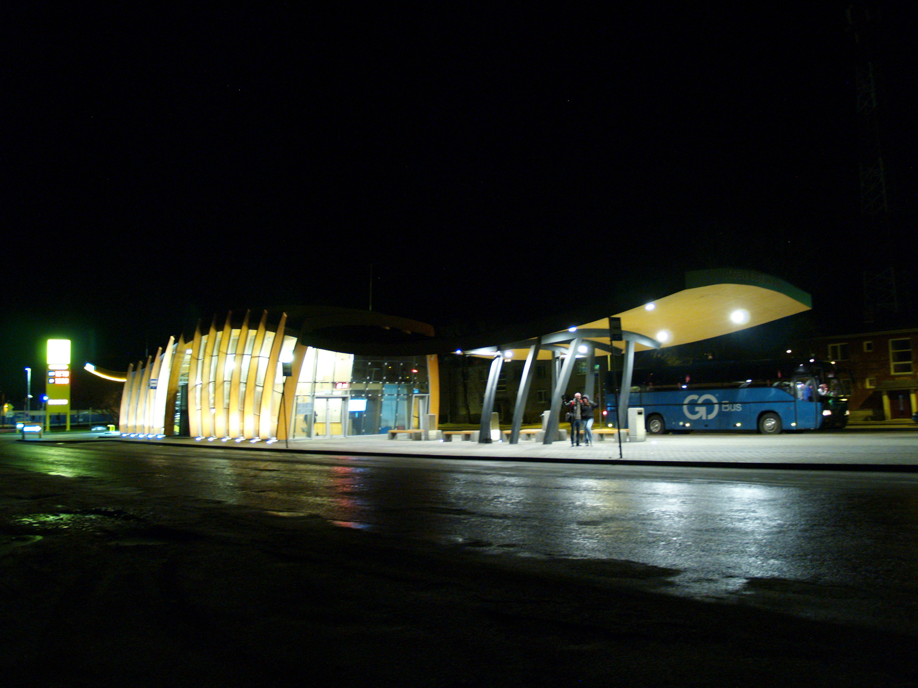 Jõgeva bussijaam